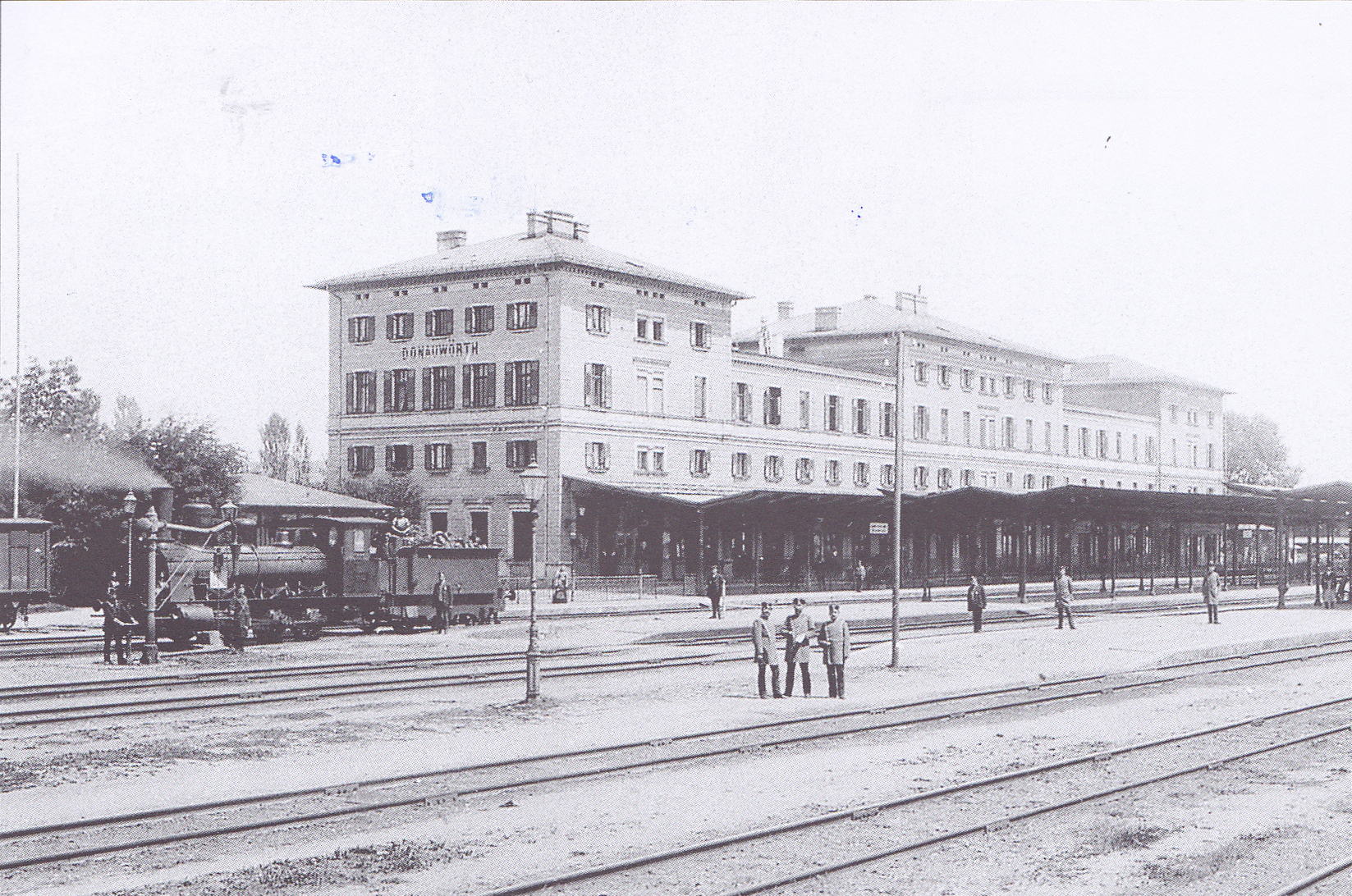 Empfangsgebäude des Bahnhofs Donauwörth von der Gleisseite mit Bahnhofspersonal und Dampflokomotive